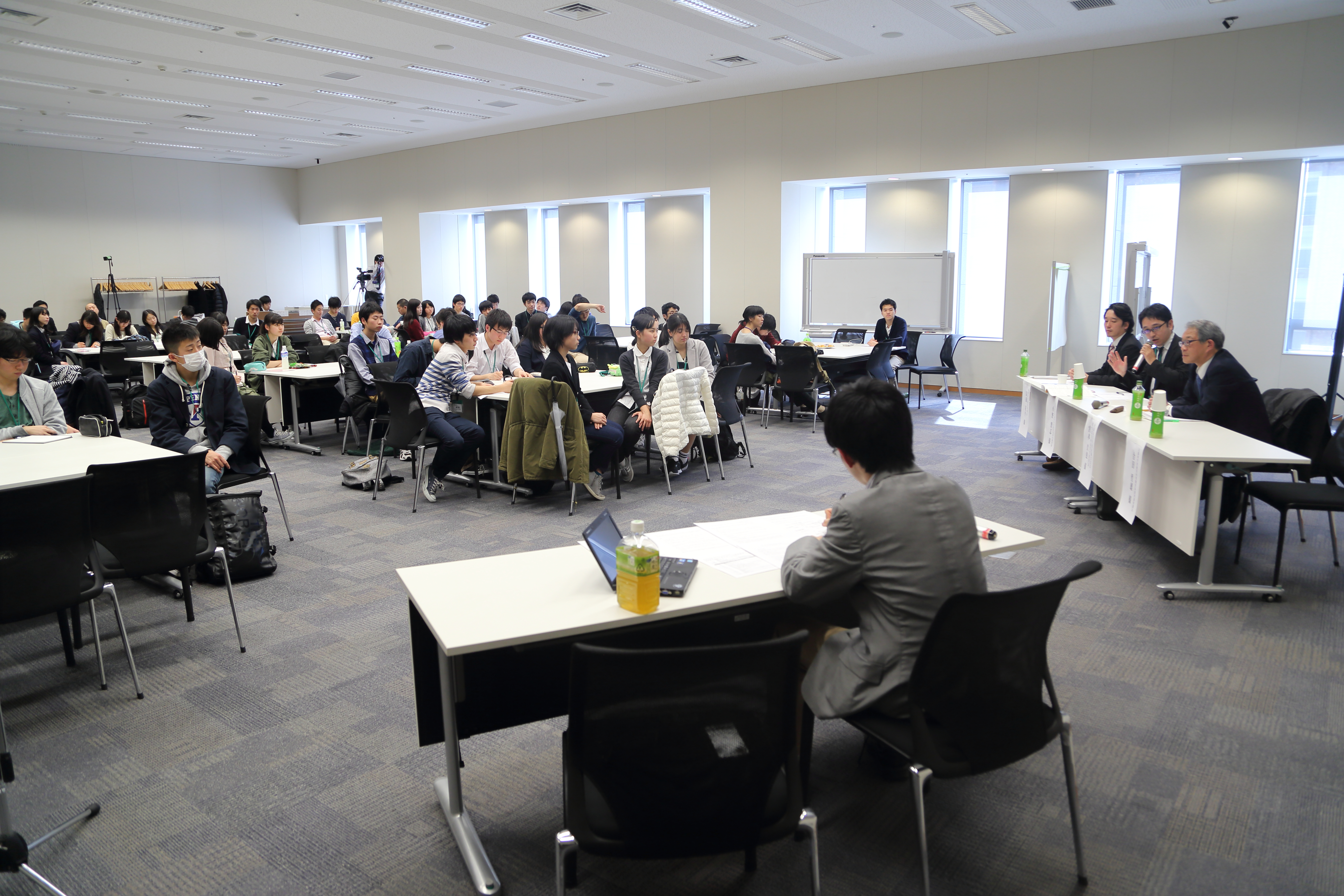 第1回日本生徒会機構